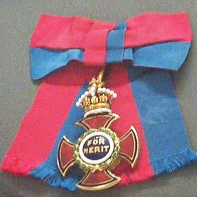 sayfasindan indirdigim resmi, keserek yarattim.